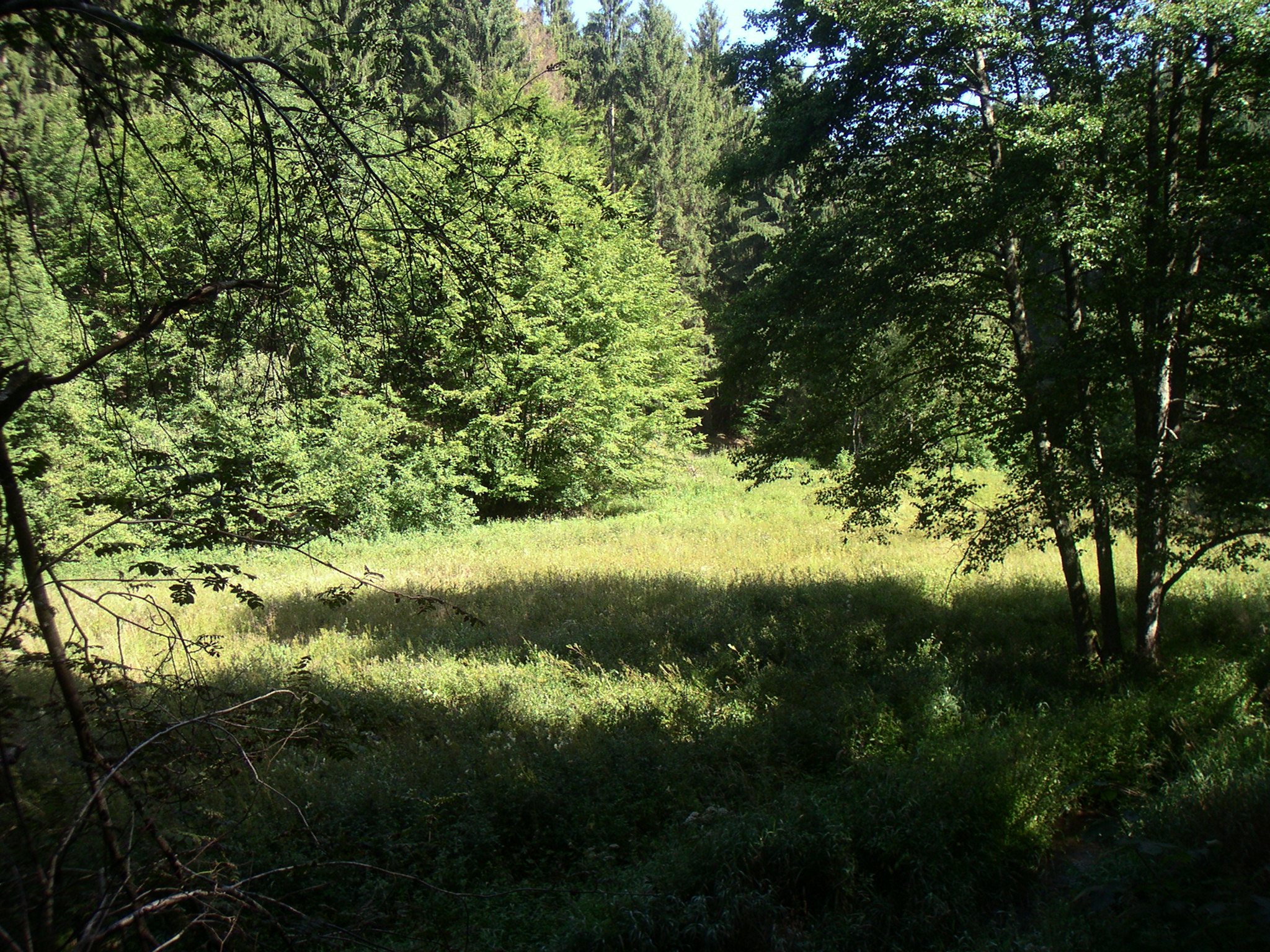 Saar-Hunsrück-Steig in der Nähe von Hermeskeil